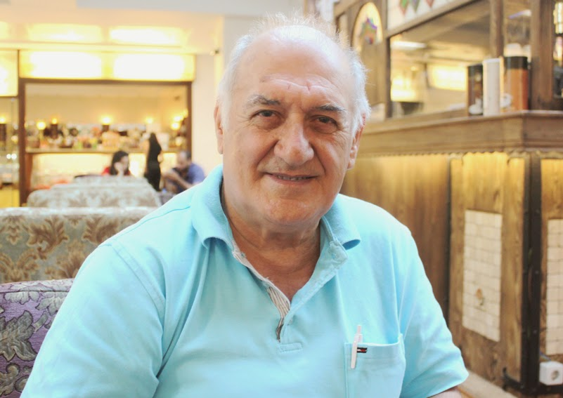 Bahri Altıntabak